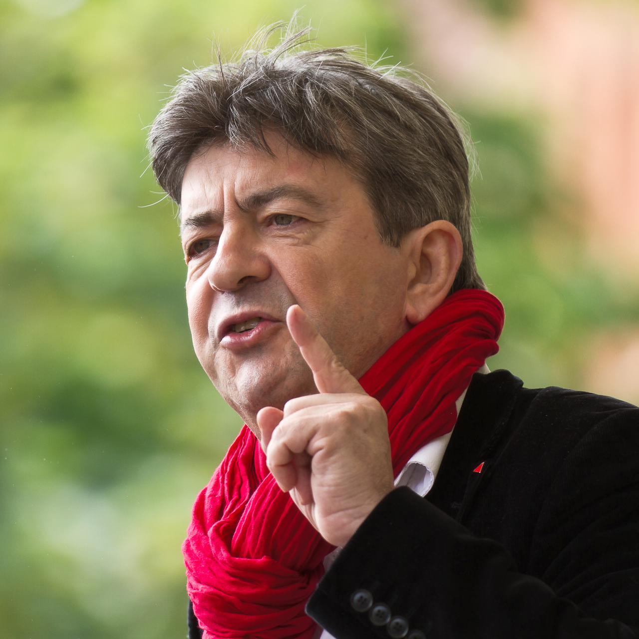 Mélenchon à la marche citoyenne pour la 6ème république à Toulouse, le 1er juin 2013